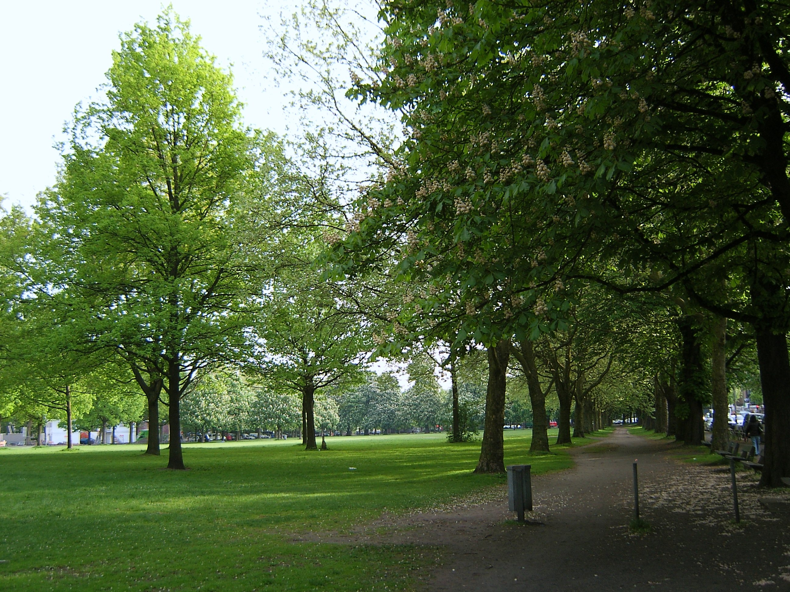 Hamburg, Rotherbaum, Dammtor, Moorweide